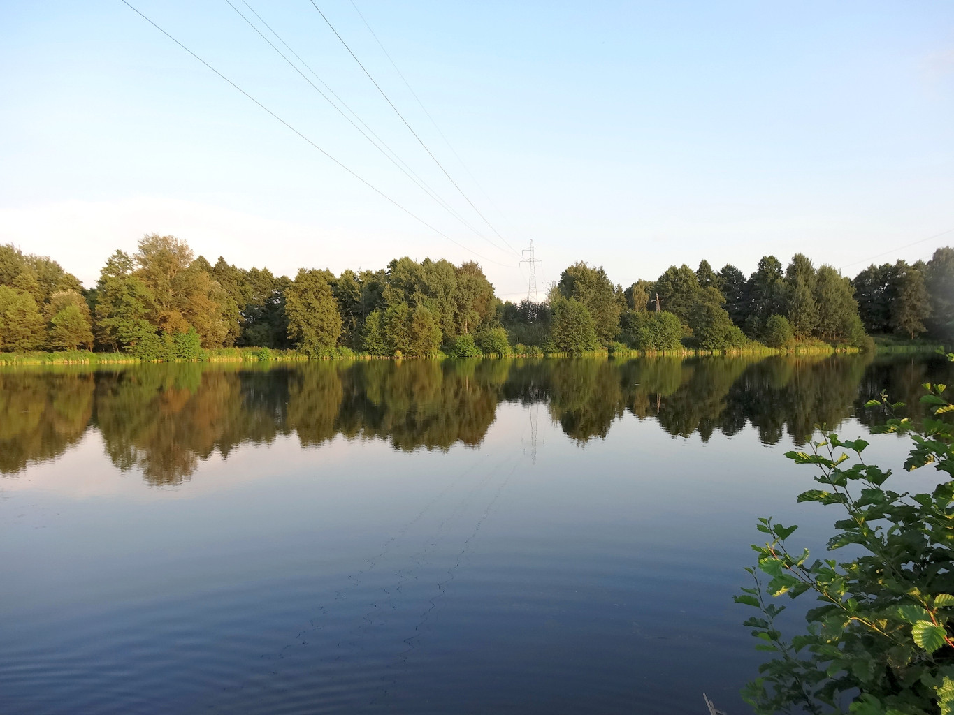 Staw Plątnowo w Łęgnowie na wschód od ul. Plątnowskiej